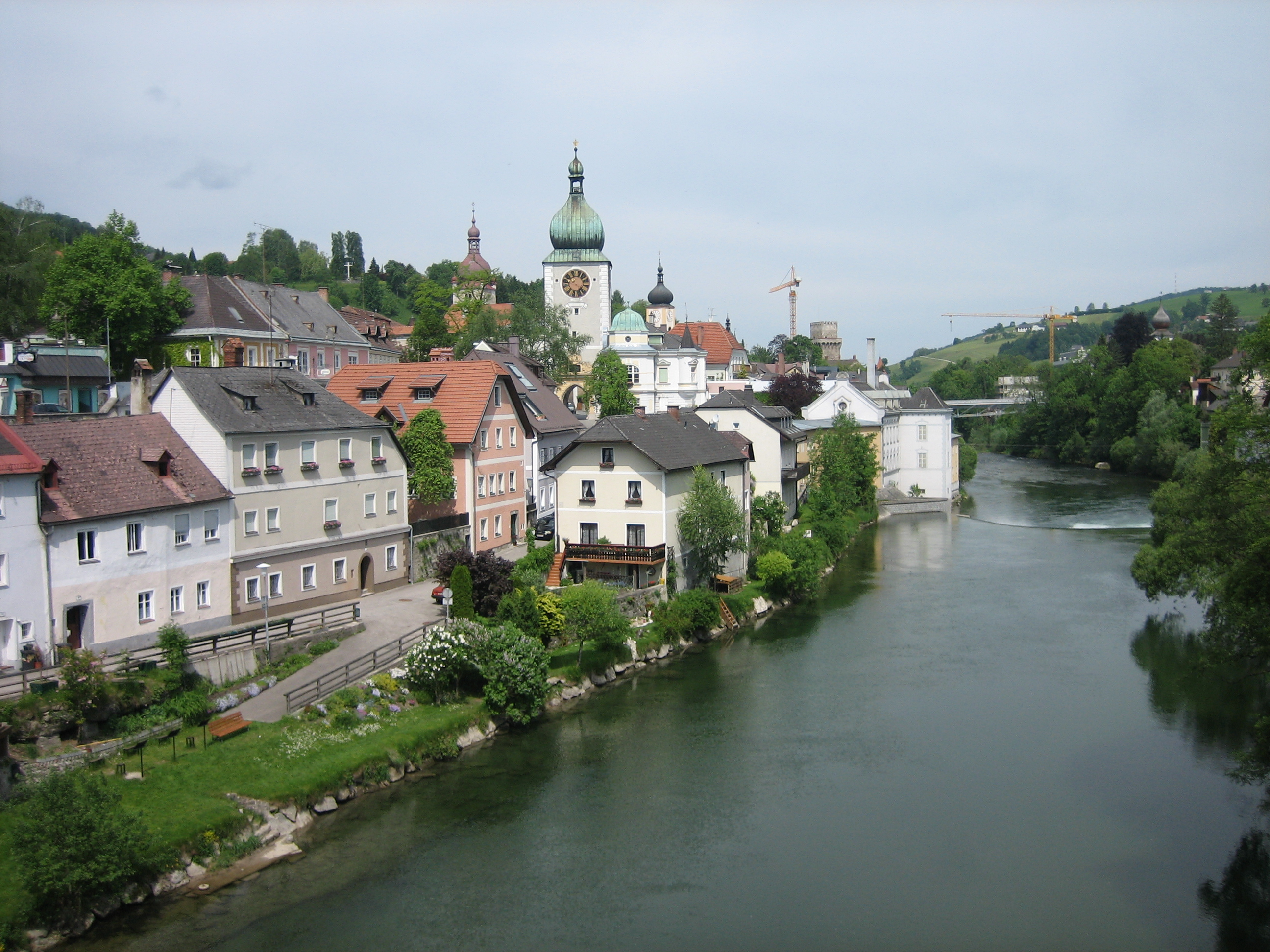 Waidhofen an der Ybbs, Lower Austria, Austria, View from Zeller Hochbrücke on city center situated on the left bank of Ybbs river. Waidhofen an der Ybbs, Niederösterreich, Österreich. Blick von der Zeller Hochbrücke auf die Innenstadt, am linken Ufer der Ybbs gelegen. 2006_05_25. Author: Martin Hirsch. Source: Own Image.